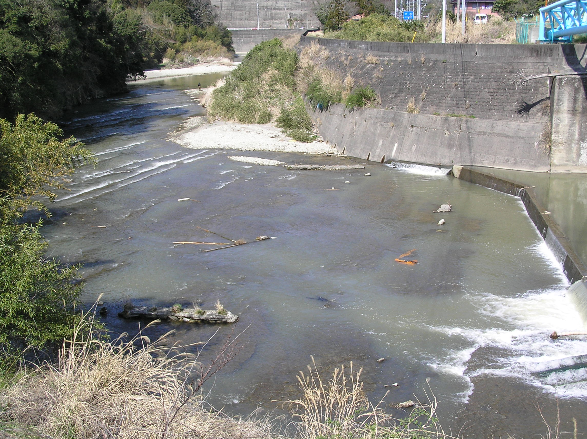 、患者が足を杭の穴に落とす場所 ～photo by Autumn Snake 【おぉたむすねィく探検隊】